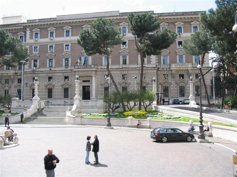 Il Palazzo del Viminale, sede del Ministero dell'Interno italiano, a Roma.